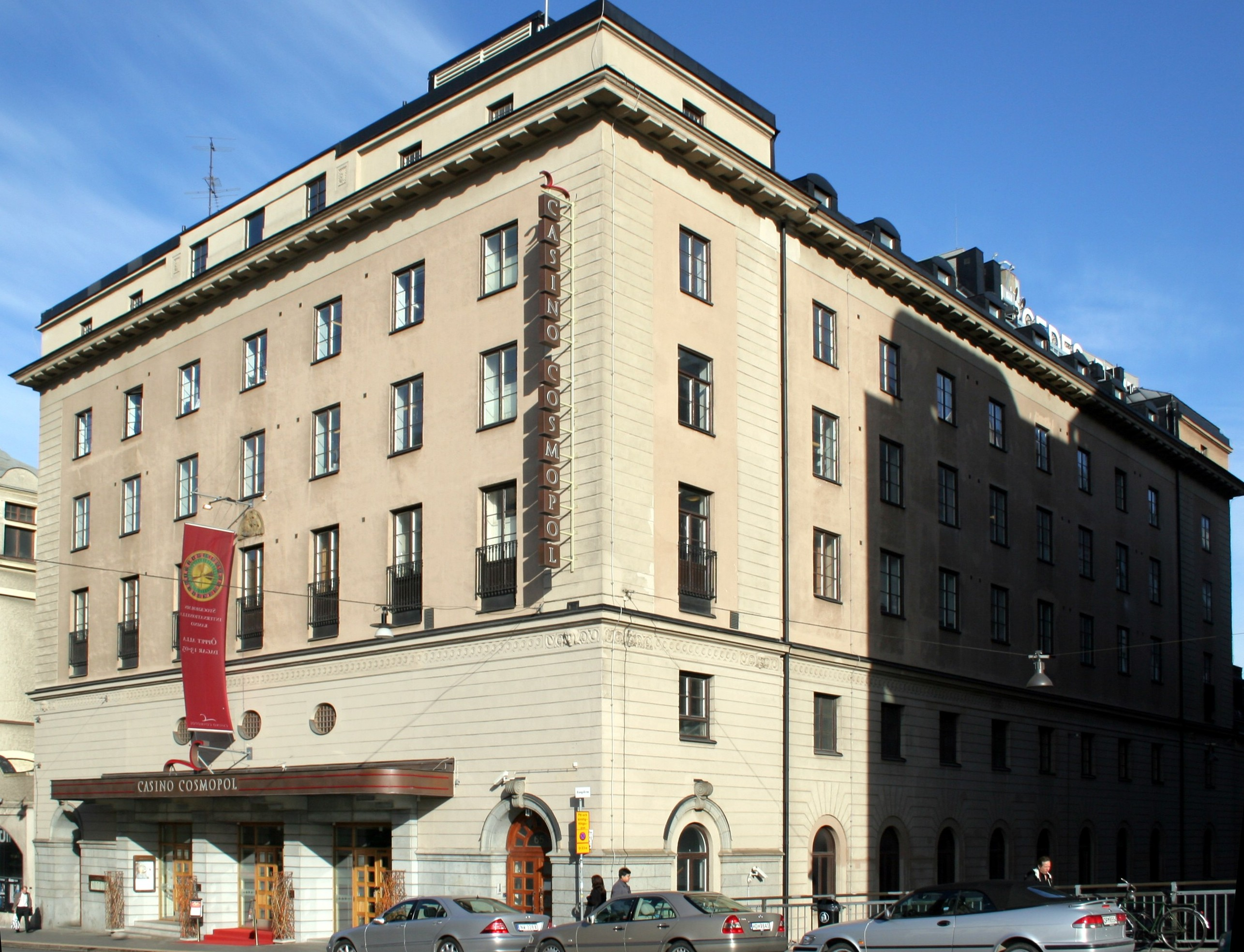 Casino Cosmopol, Stockholm, Sweden. Built 1916-1918. Före detta Biograf Palladium